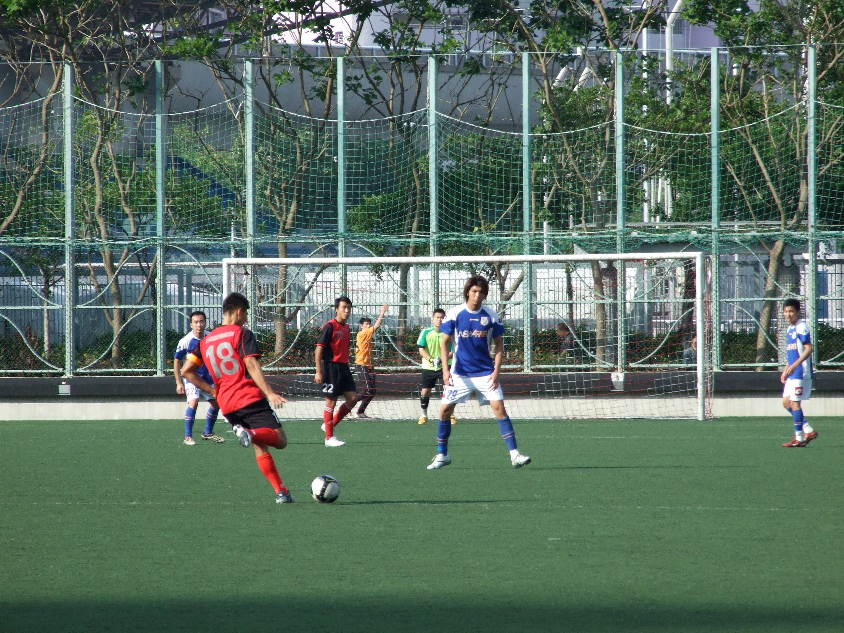 中文（香港）: 消防1-1賽和宏輝駒騰